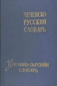 Фотография чеченско-русского словаря